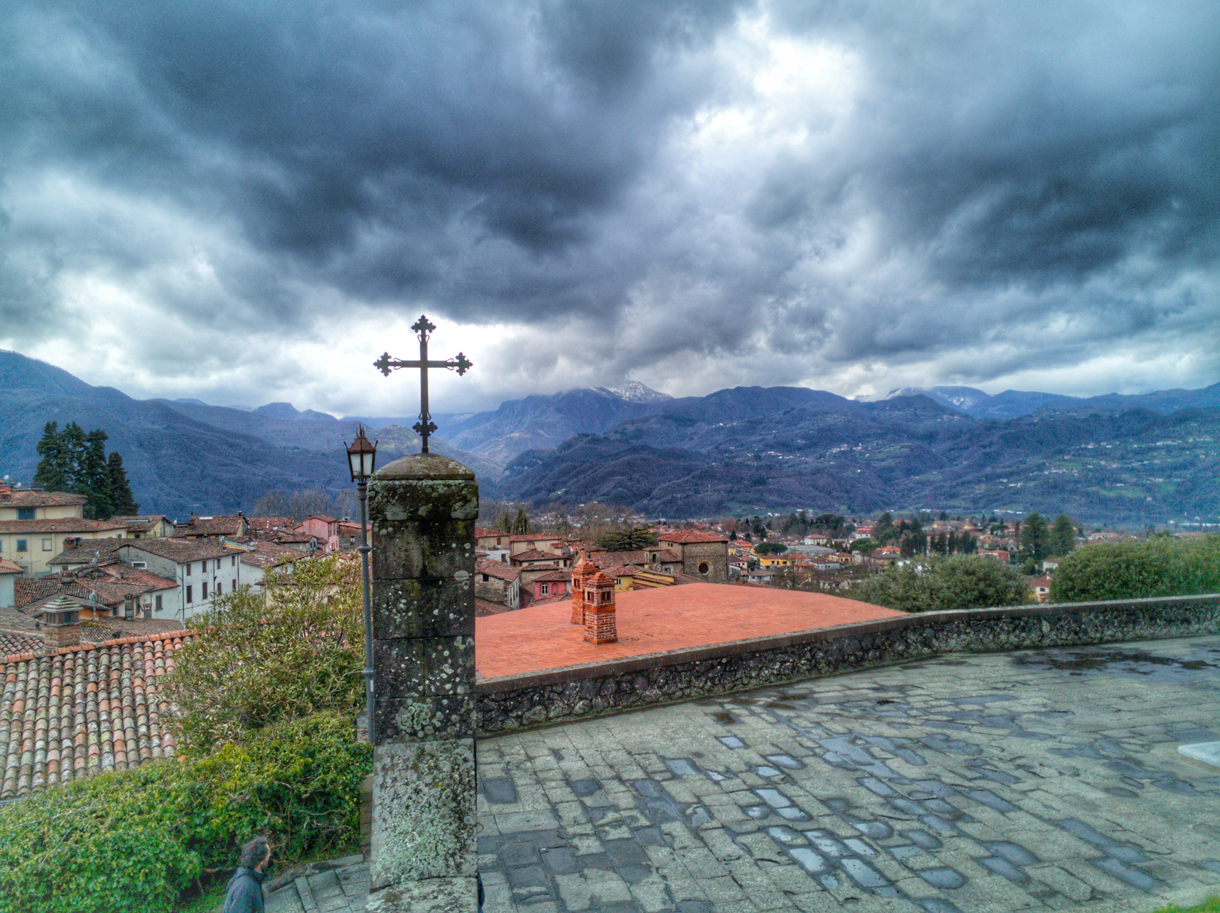 Blick vom Portal des Doms (Duomo di San Cristoforo) nach Osten in die Apuanischen Alpen